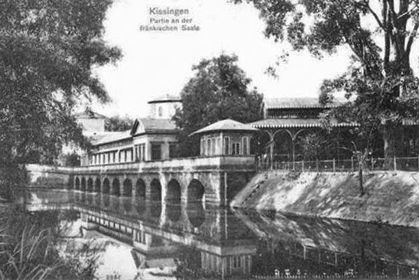 Rückwärtige Sicht auf Brunnenhalle und Arkadenbau am Ostufer der Fränkischen Saale in Bad Kissingen (um 1900)